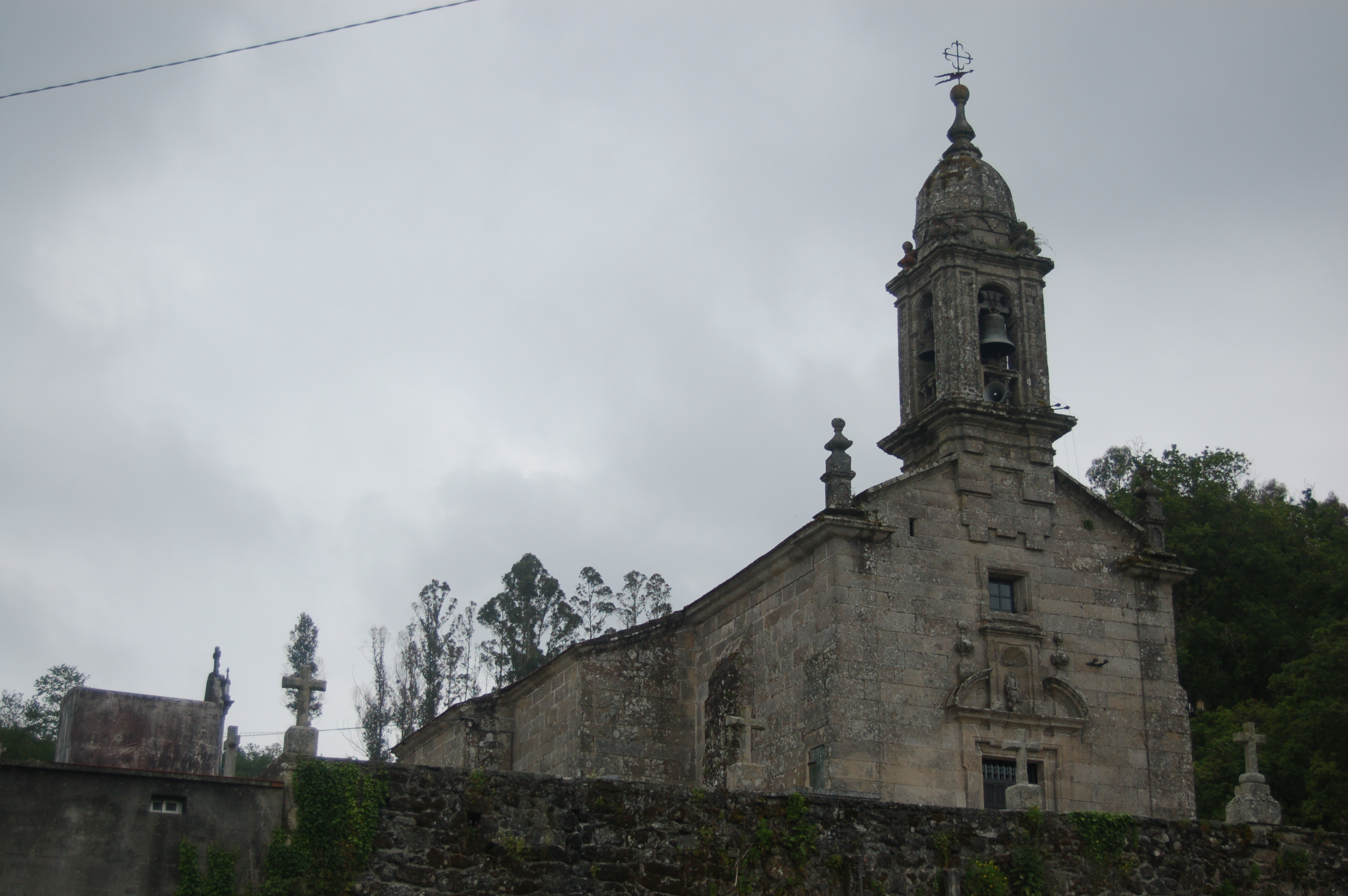 Igrexa parroquial de San Mamede de Amil (Moraña)